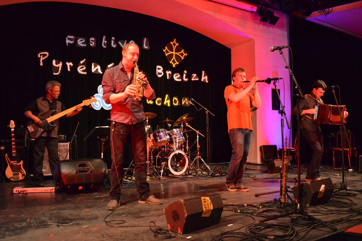 Ampouailh au Festival Pyrénées-Breizh à Luchon le 3 mai 2014.